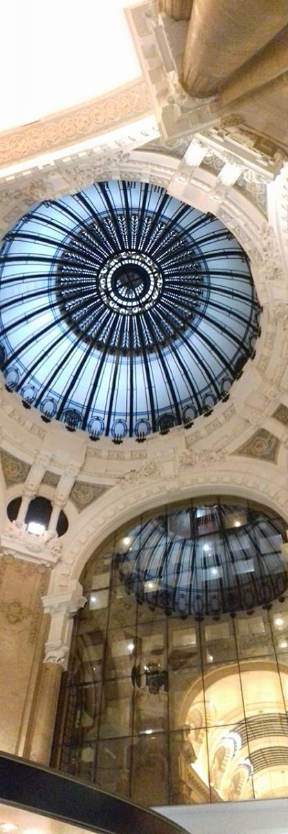 Interior de la galería hacia la calle Florida: cúpula original de acero y vidrio reflejada en courtain wall.